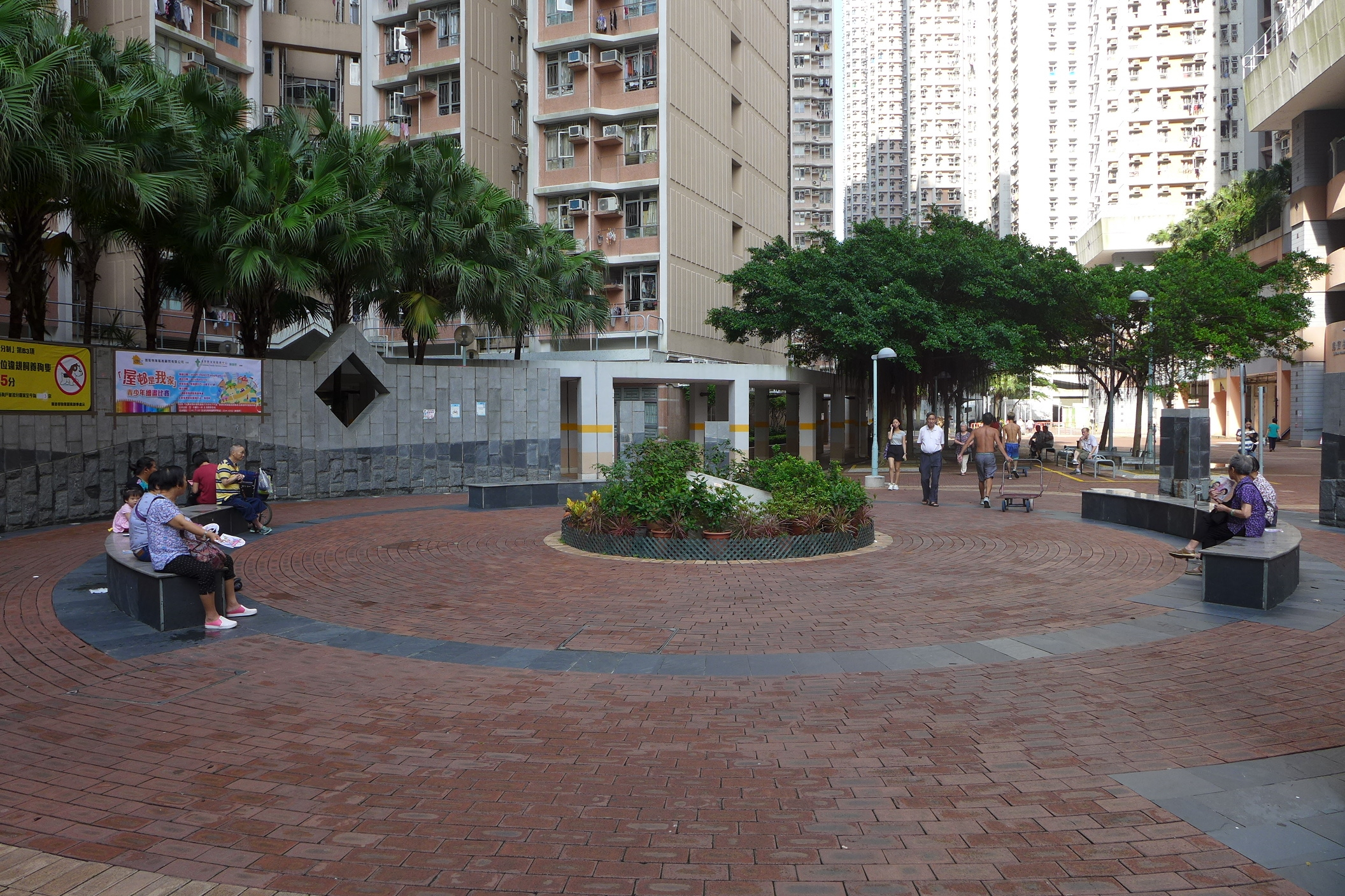 Po Tat Estate Garden Plaza